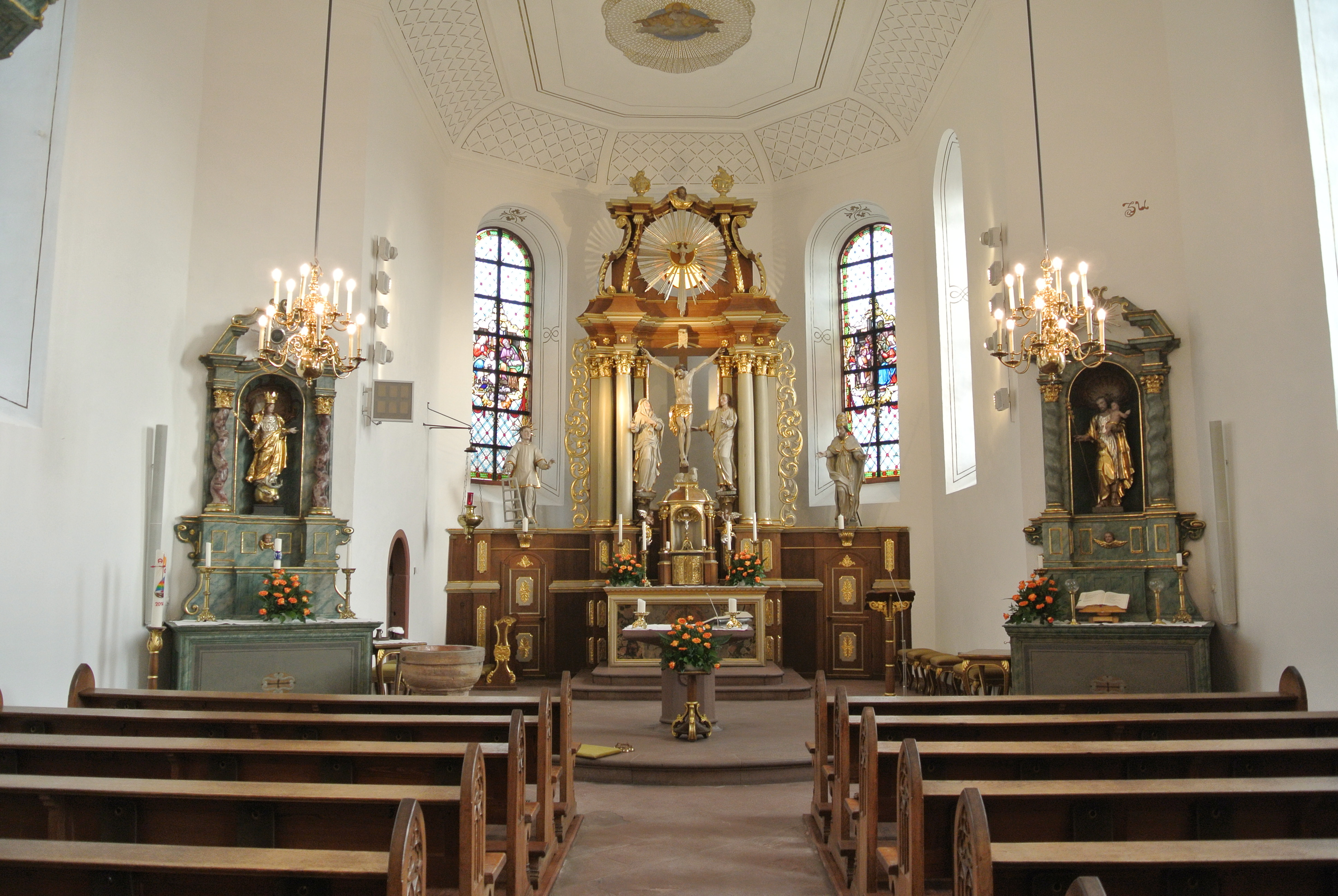 Katholische St. Laurentiuskirche in Frankfurt-Kalbach, barocke Saalkirche von 1765, Baumeister Christian Fritz, Hochaltar von 1700